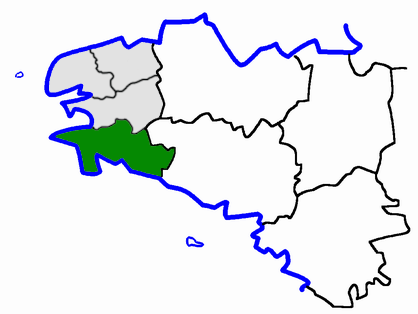 Arrondissement of Quimper, Département Finistére, France